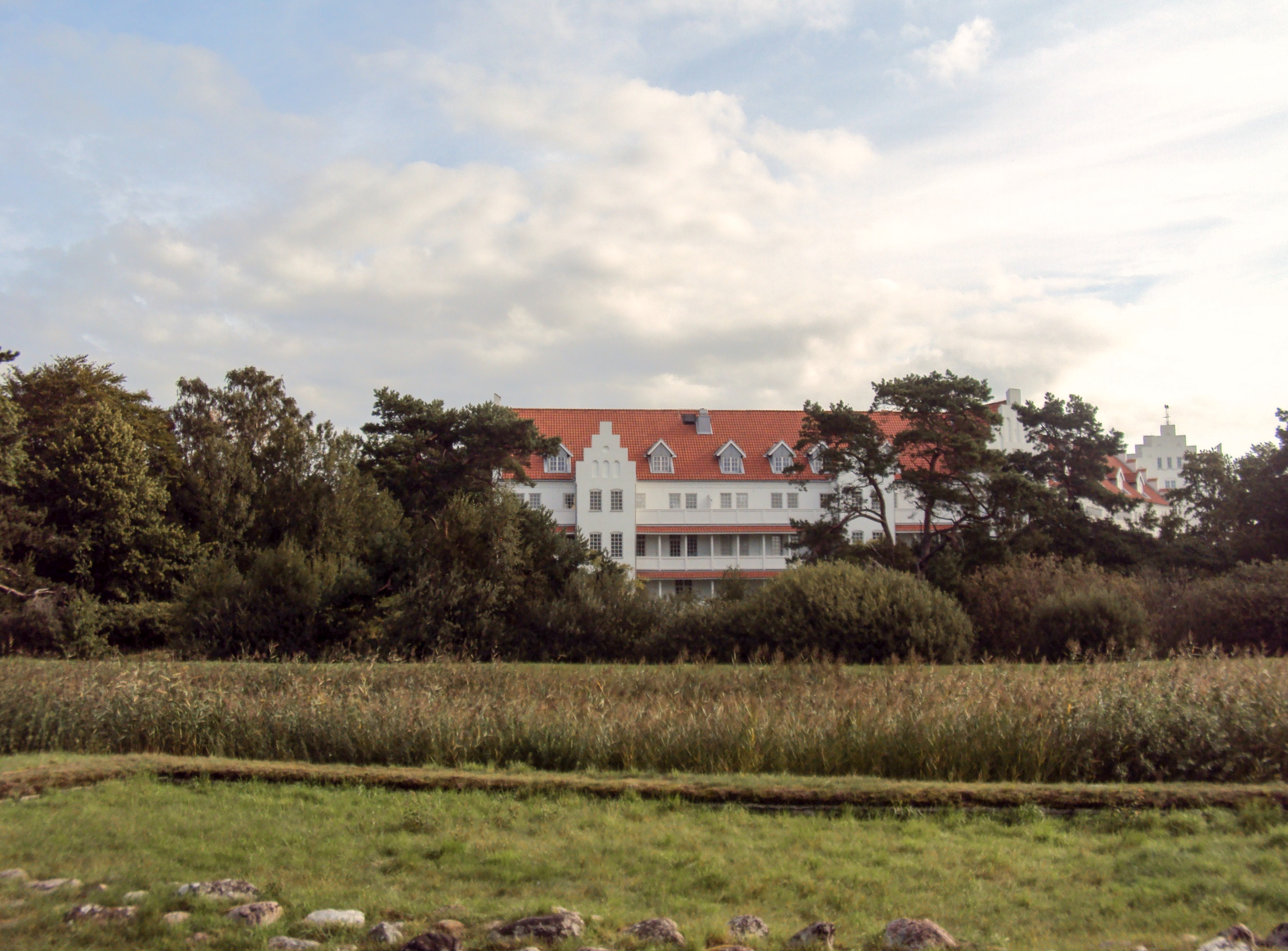 Falsterbohus från muren på ruinen